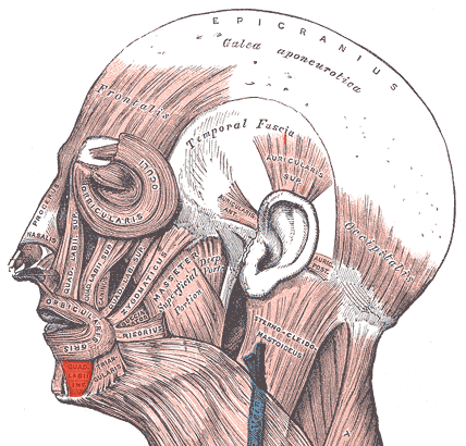 Depressor labii inferioris muscle